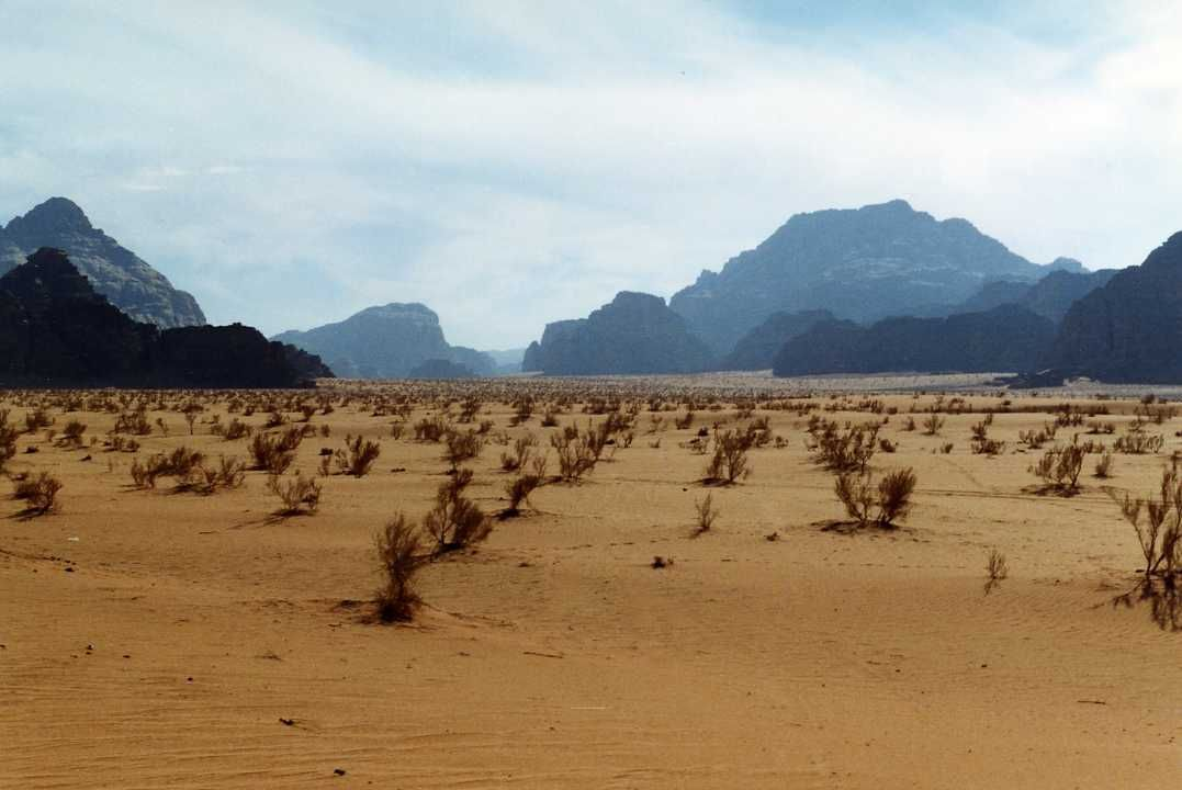 Beschreibung: Wüstenlandschaft im Wadi Rum, JordanienQuelle: Eigenes FotoAutor: Stefan VolkDatum: Februar 2002